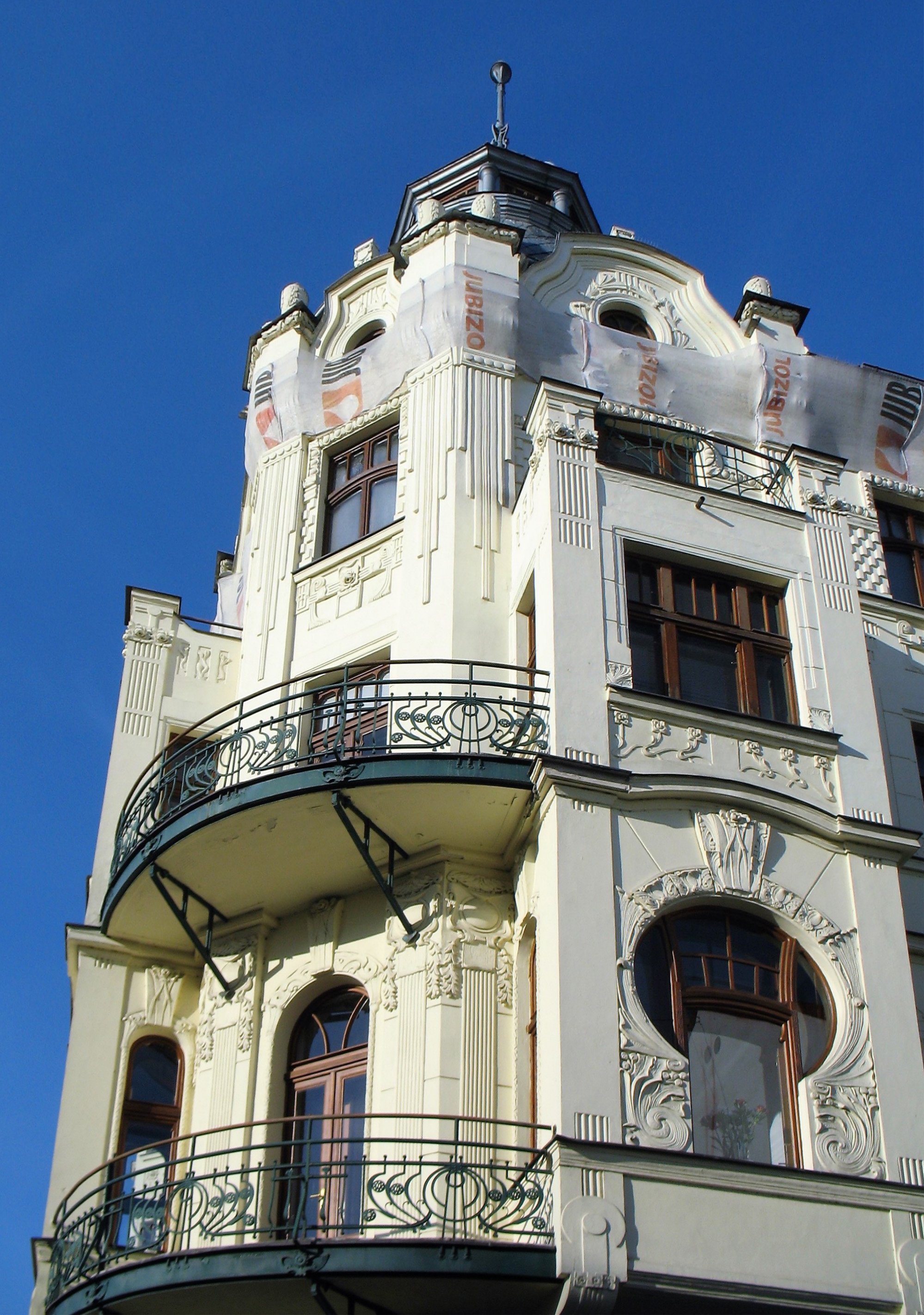 Secesní budova kavárny Union na rohu ulic Sokolské a Jindřicha z Lipé v České Lípě